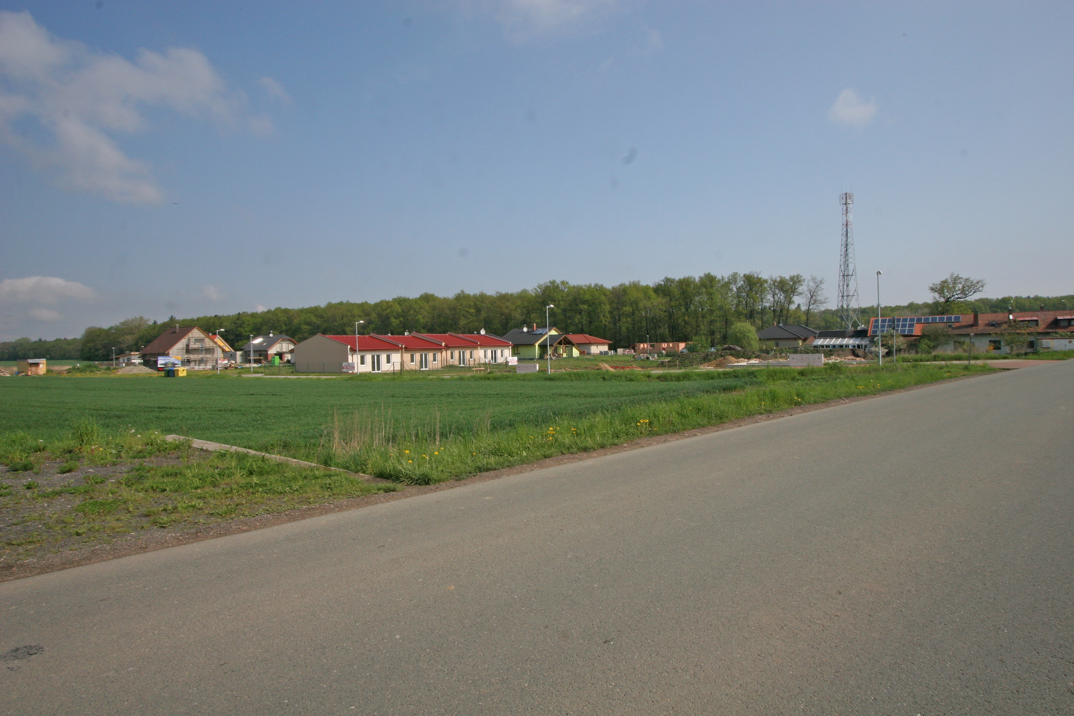 Staročernsko nová výstavba Dubská ulice